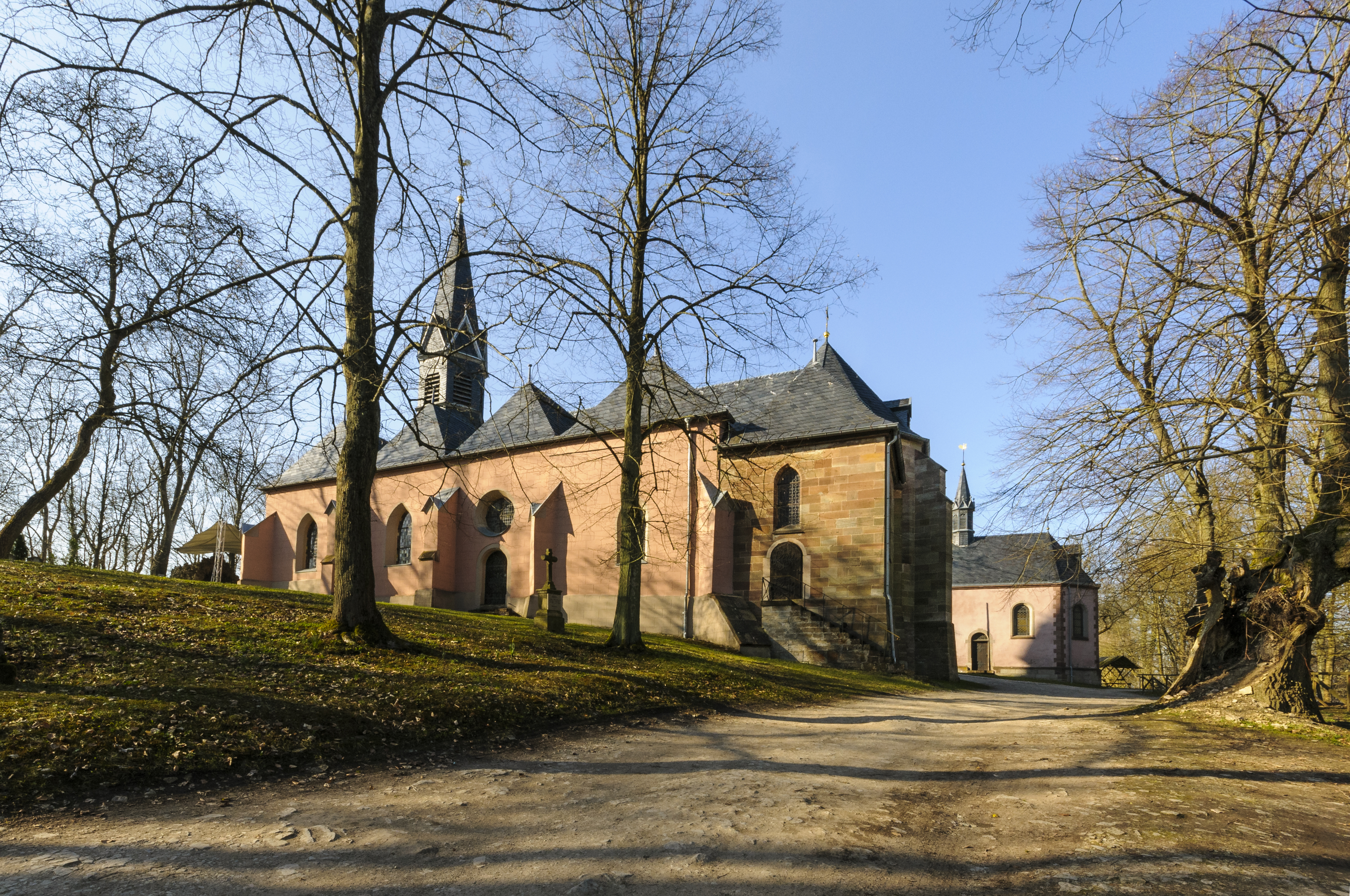 Erlöserkirche St. Salvator, Wallfahrtsstätte Hülfensberg/Eichsfeld